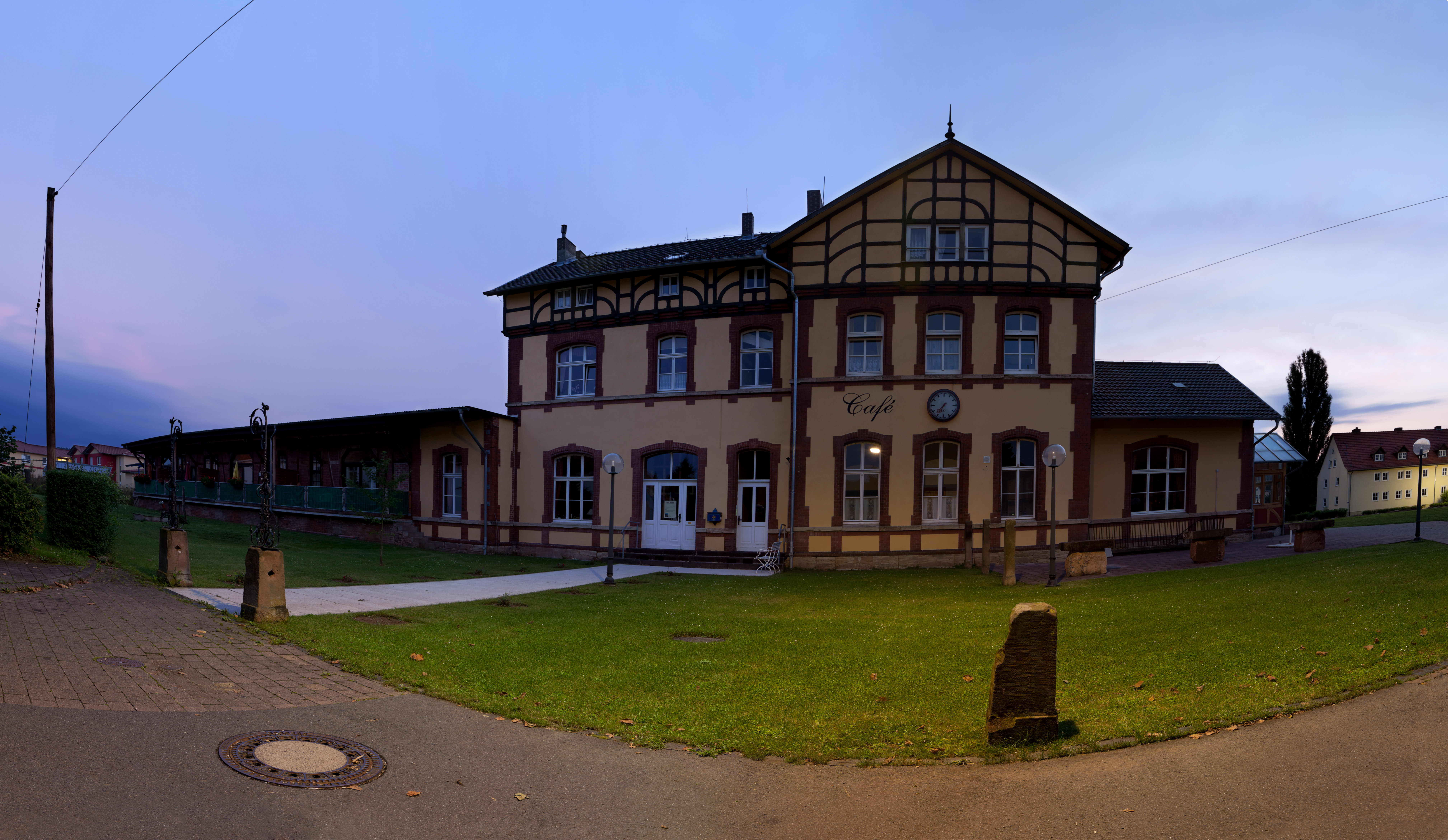 Alter Bahnhof, Wanfried. Flur 13, Flurstück 223/3.